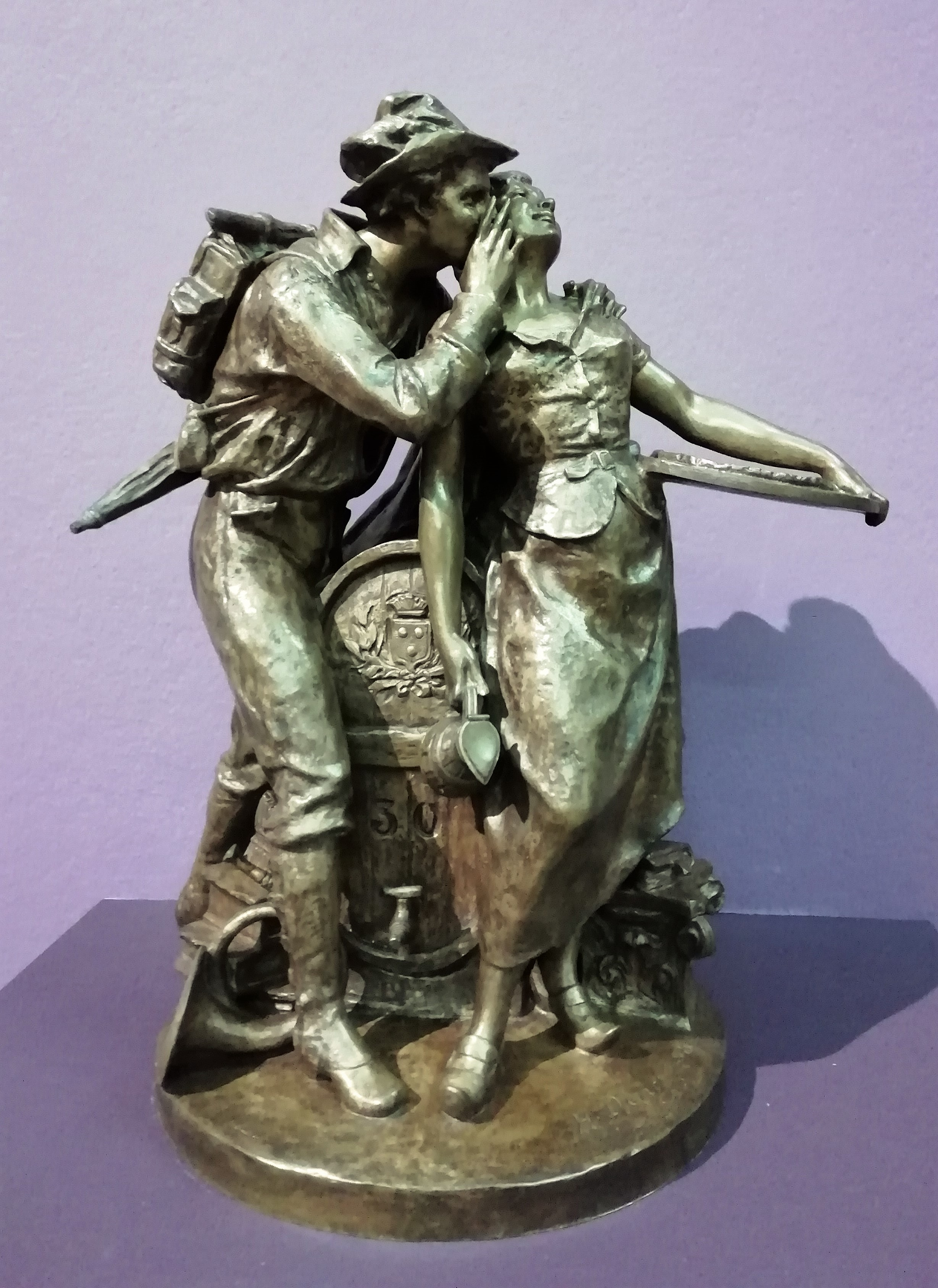 Henri Ding (1844-1898), La Vénus de la Pogne, 1888, bronze, Legs de Louis G. en 1900. Salon de Grenoble. Informations tirées de la plaquette de l'Exposition temporaire Grenoble et ses artistes au XIXe siècle au musée de Grenoble et la base Joconde.